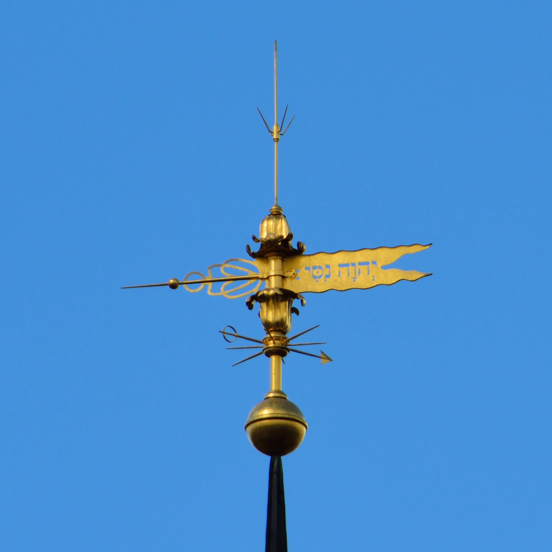 Wetterfahne auf der Turmspitze des Hausmannsturms im Schloss in Dresden mit dem hebräischen Schriftzug יְהֹוָה נִסִּי׃ (Jehovah nissi) nach Exodus 17,15: ויבן משה מזבח ויקרא שמו יהוה נסי׃ And Moses built an altar, and called the name of it Jehovahnissi: (King James Bible), cf. Jehovah-nissi Vnd Mose bawet einen Altar / vnd hies jn / der HERR / Nissi / (NISSI) Das heisst / mein Panir. (Luther 1545) Und Mose baute einen Altar und nannte ihn: Der HERR mein Feldzeichen. (Luther 2017) Die Septuaginta übersetzte nissi mit „καταφυγή“ (Zuflucht), die Vulgata mit „exaltatio“ (Erhöhung).